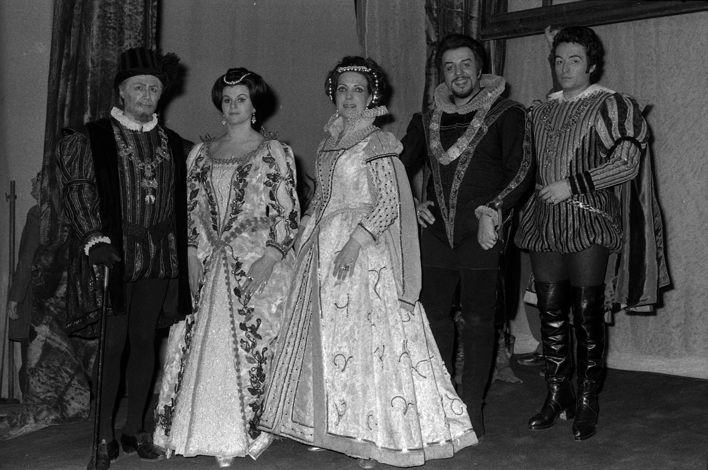 Théâtre du Capitole. Le 25 Février 1972. Vue de la représentation de Don Carlos au théâtre du Capitole.